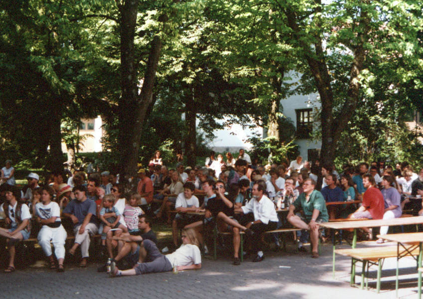 KultURKNALL 1994 Sonstiges: Zur Verfügung gestellt von Menschen Helfen e.V.